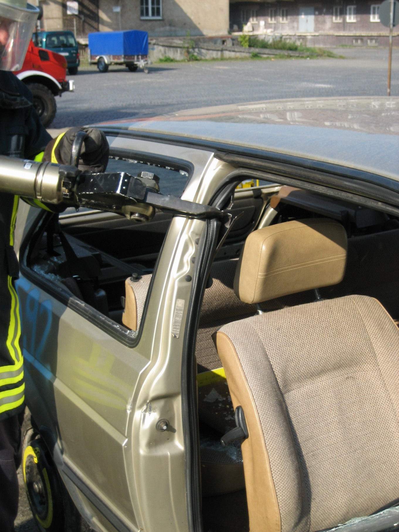 Einsatz der Rettungsschere, durchtrennen der B-Säule (Goettingen, Germany )